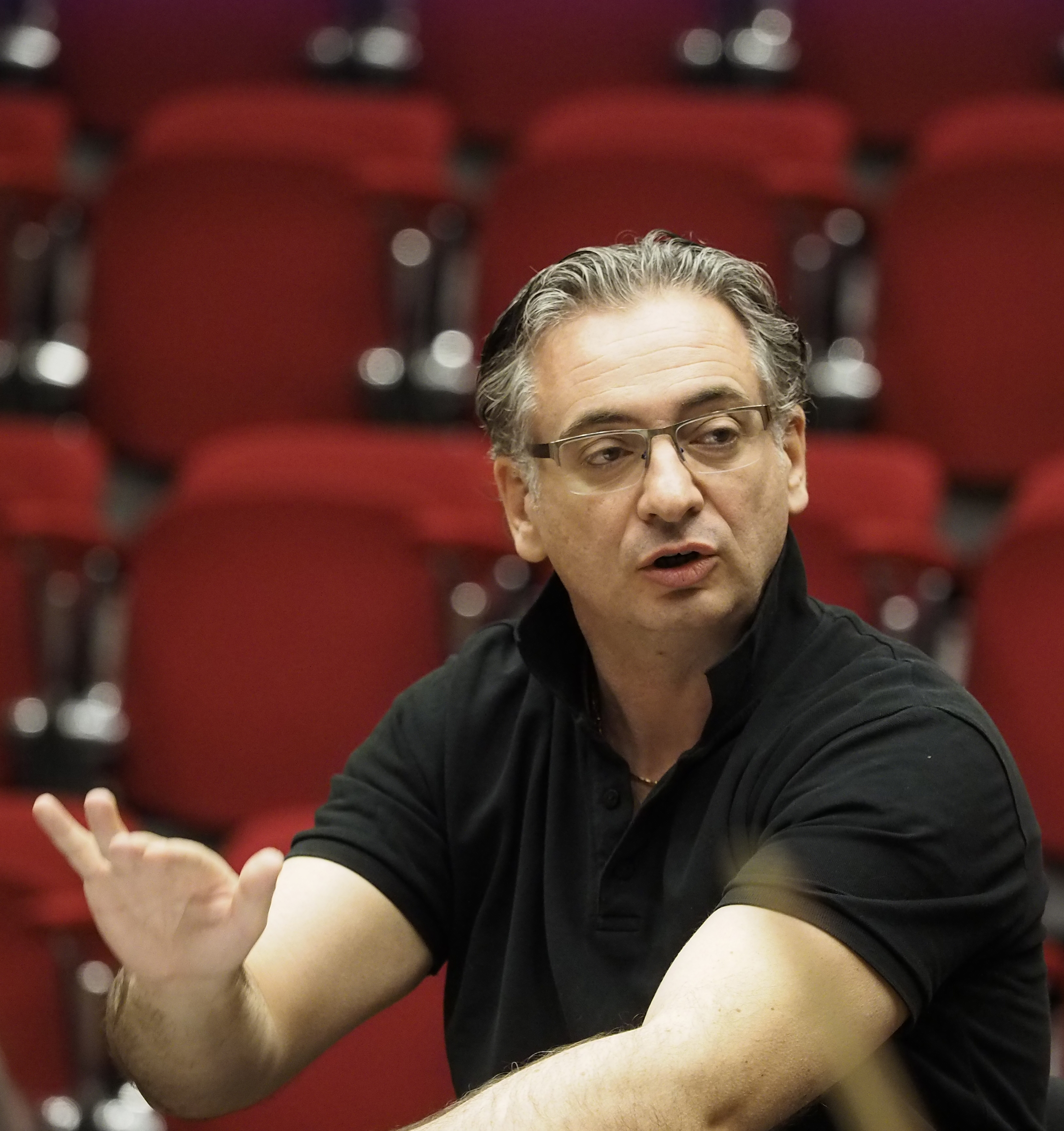 Yannis Pouspourikas, Lugano 2016, copyright D.Vass